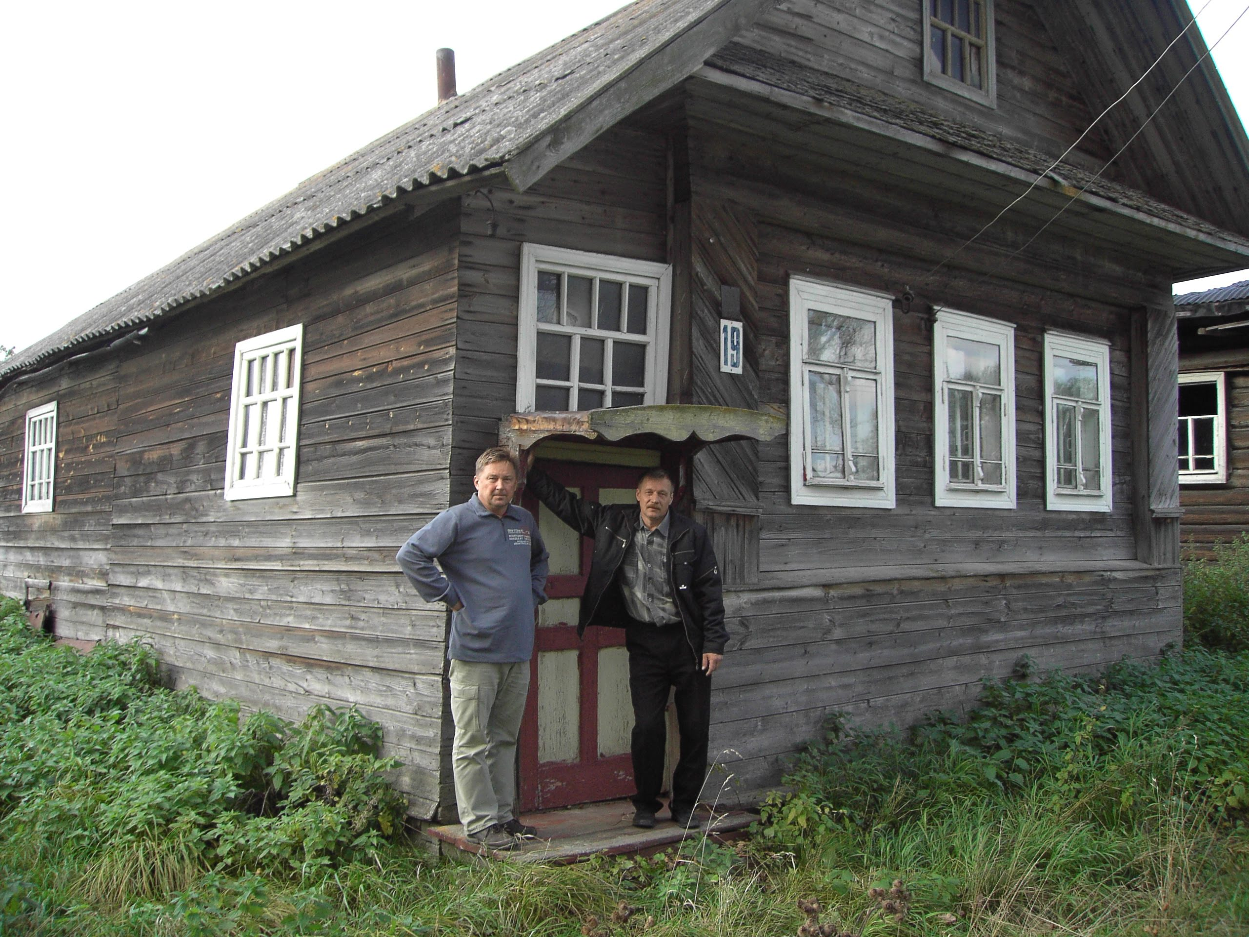 дом в д. Корницы Бежецкого района Тверской обл.